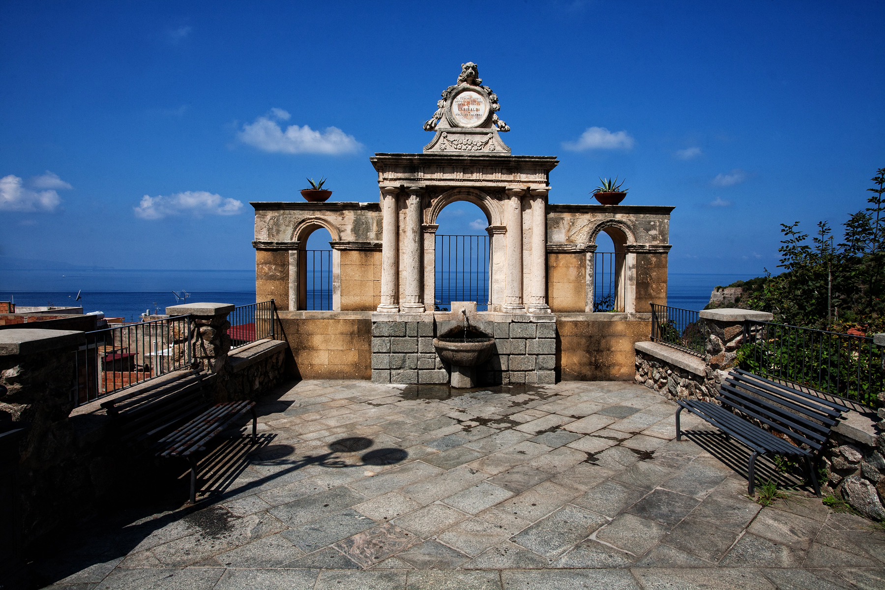 Fonte Garibaldi This is a photo of a monument which is part of cultural heritage of Italy.